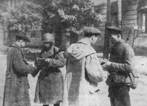 На фотографии изображён патруль 10-й стрелковой дивизии внутренних войск НКВД проверяющий документы на улицах Сталинграда. Фотография сделано до 28 сентября 1942 года, когда дивизия была выведена в Челябинск на переформирование